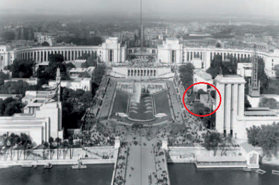 Ubicació a l'Expo de París de 1937